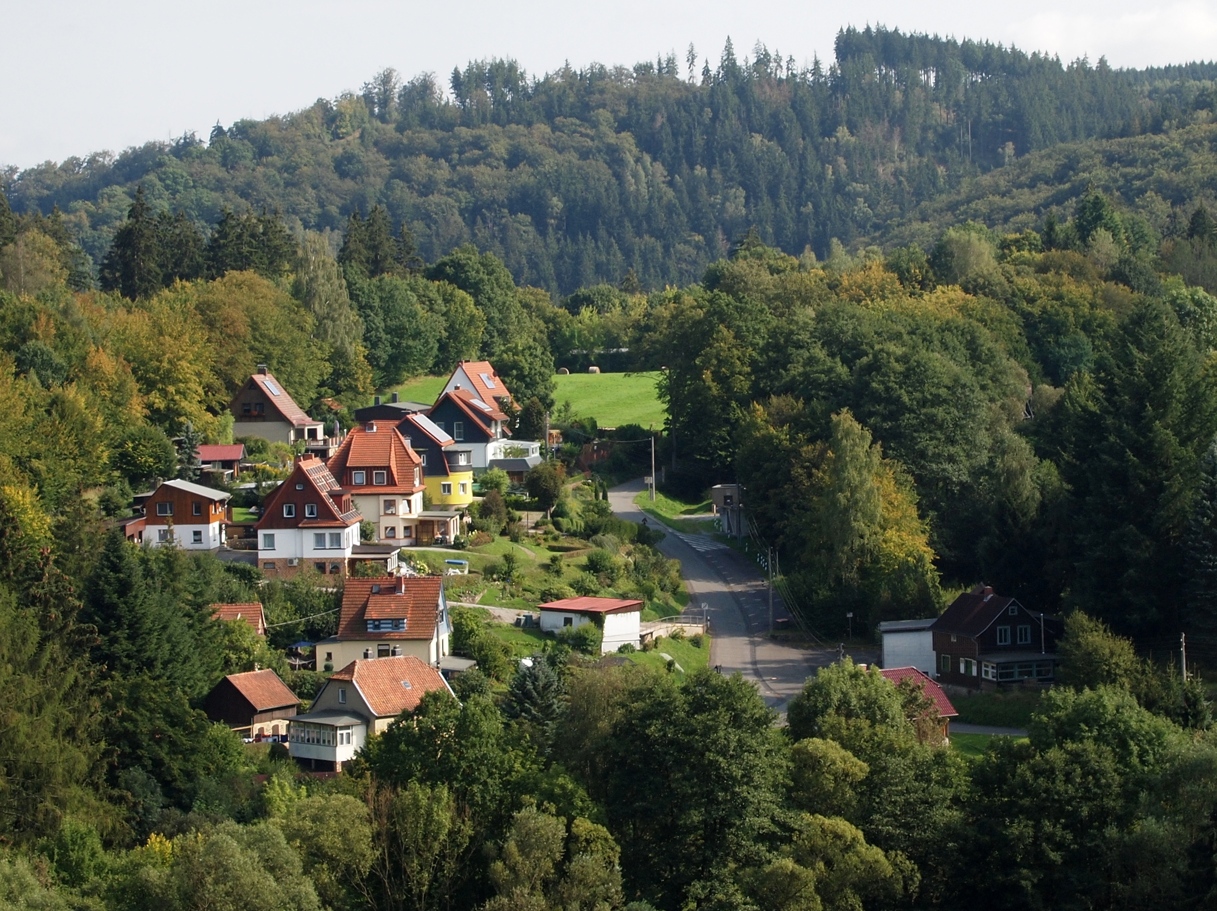 Altenbrak (Stadt Thale) Landkreis Harz, Sachsen-Anhalt; Blick vom Forstweg über das tiefer liegende Unterdorf hinüber zum Rolandseck